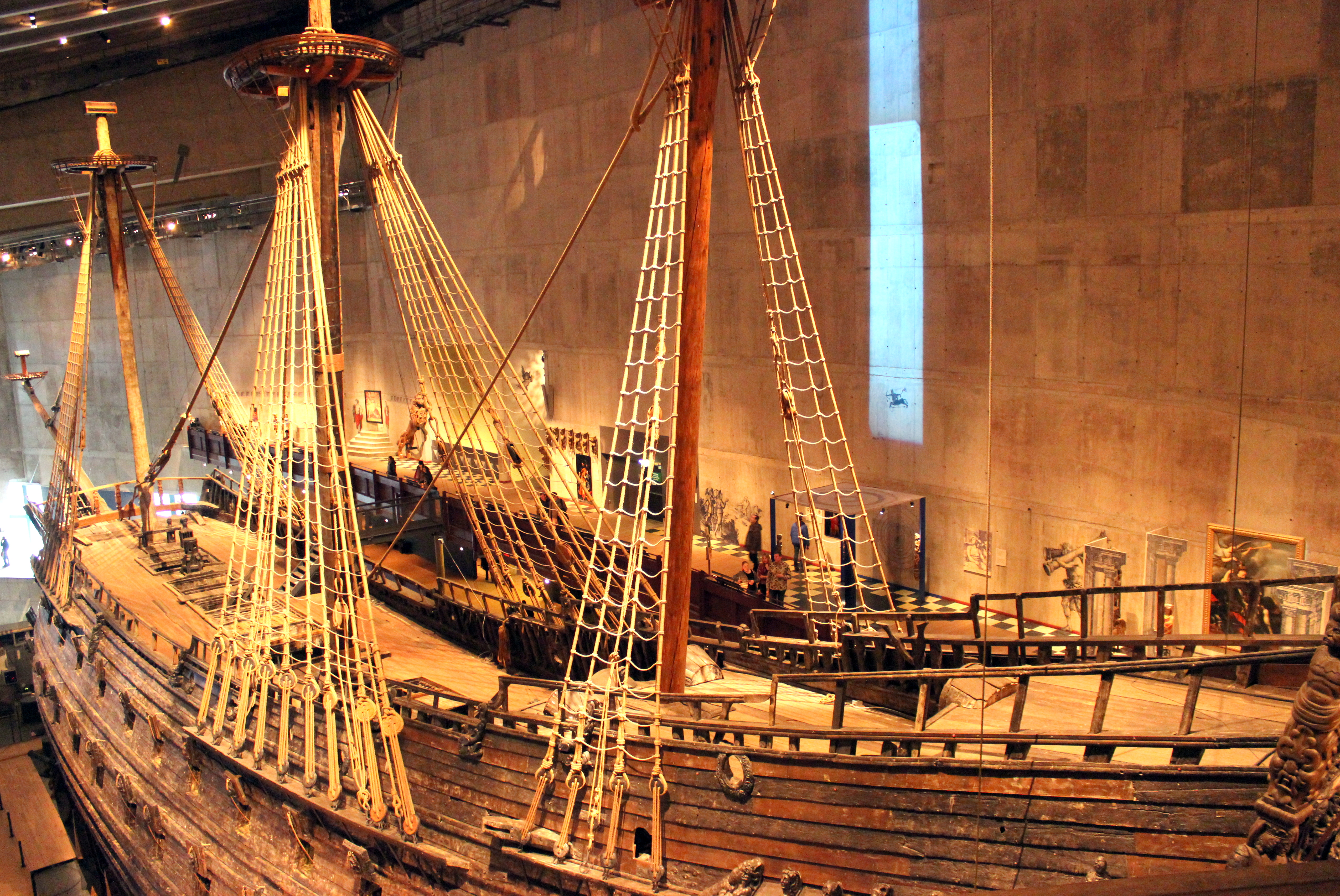 Djurgården, Östermalm, Stockholm, Sweden